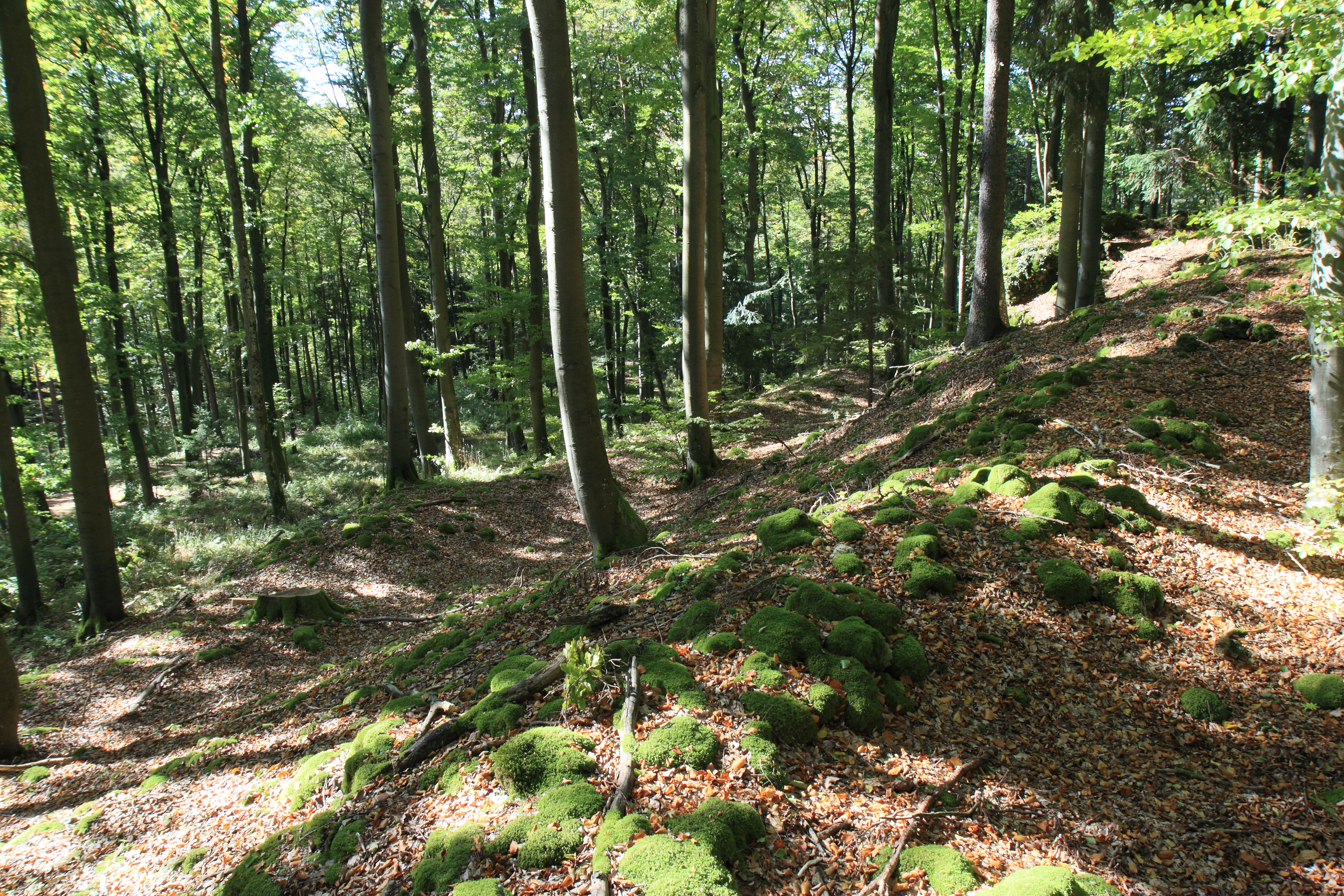 Ringwall Schlossberg - Doppelter Wallzug im Bereich des früheren Zuganges